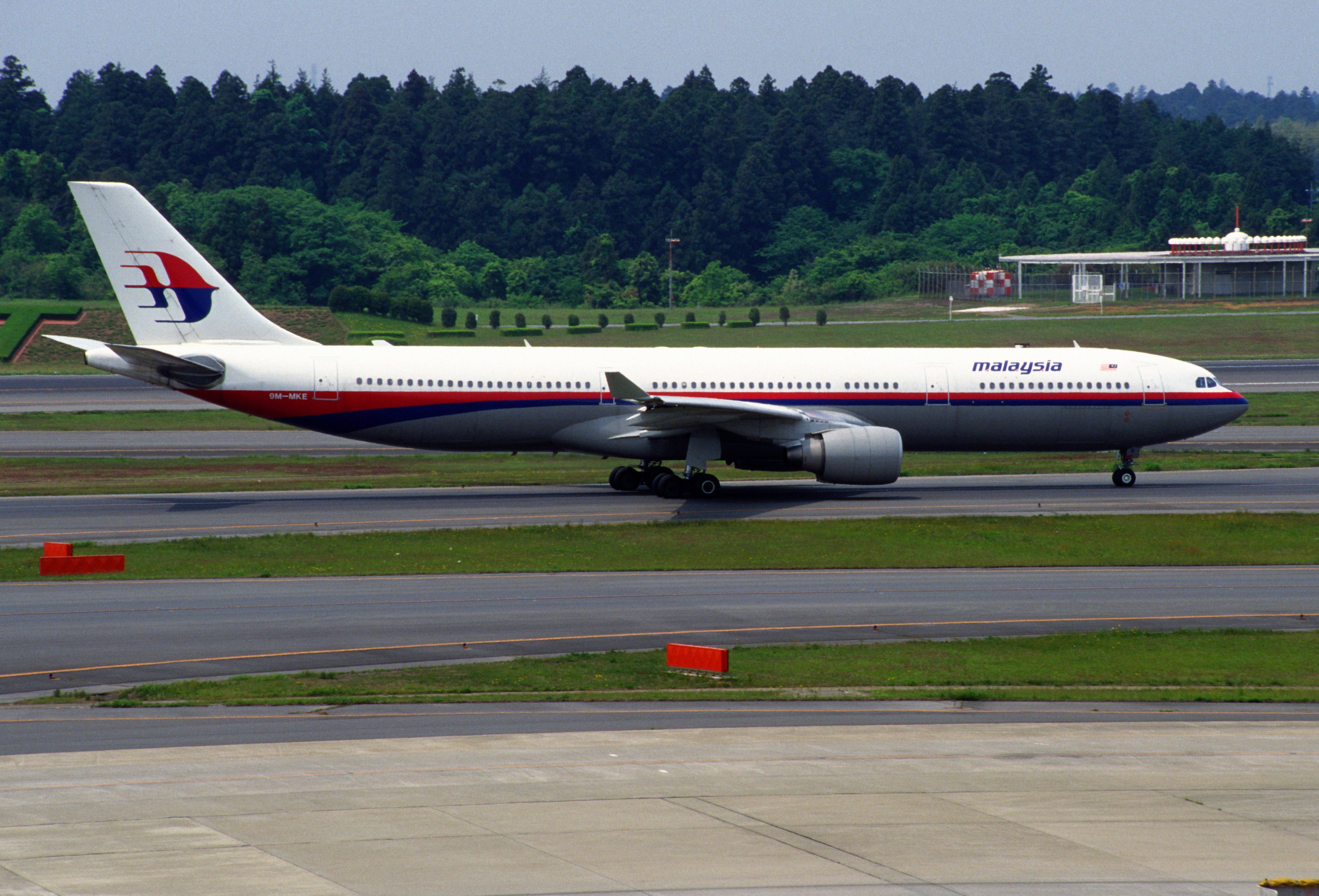 MALAYSIA AIRLINES Airbus A330-322 (9M-MKE/077)